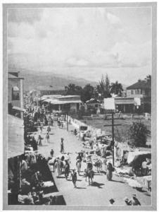 Vue de la ville portuaire de Petit-Goâve.